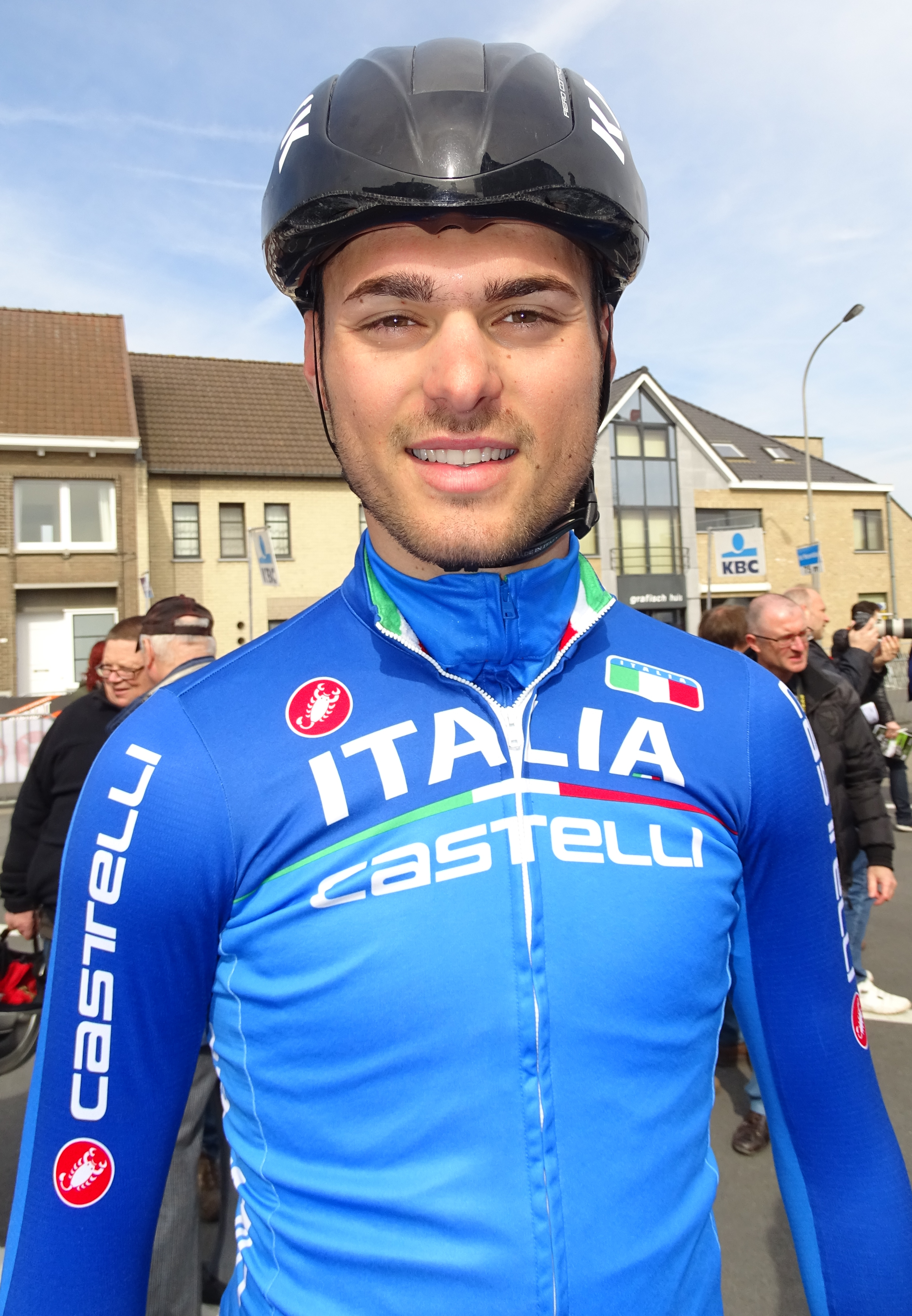 Reportage réalisé le samedi 9 avril à l'occasion du départ et de l'arrivée du Tour des Flandres espoirs 2016 à Audenarde, Belgique.